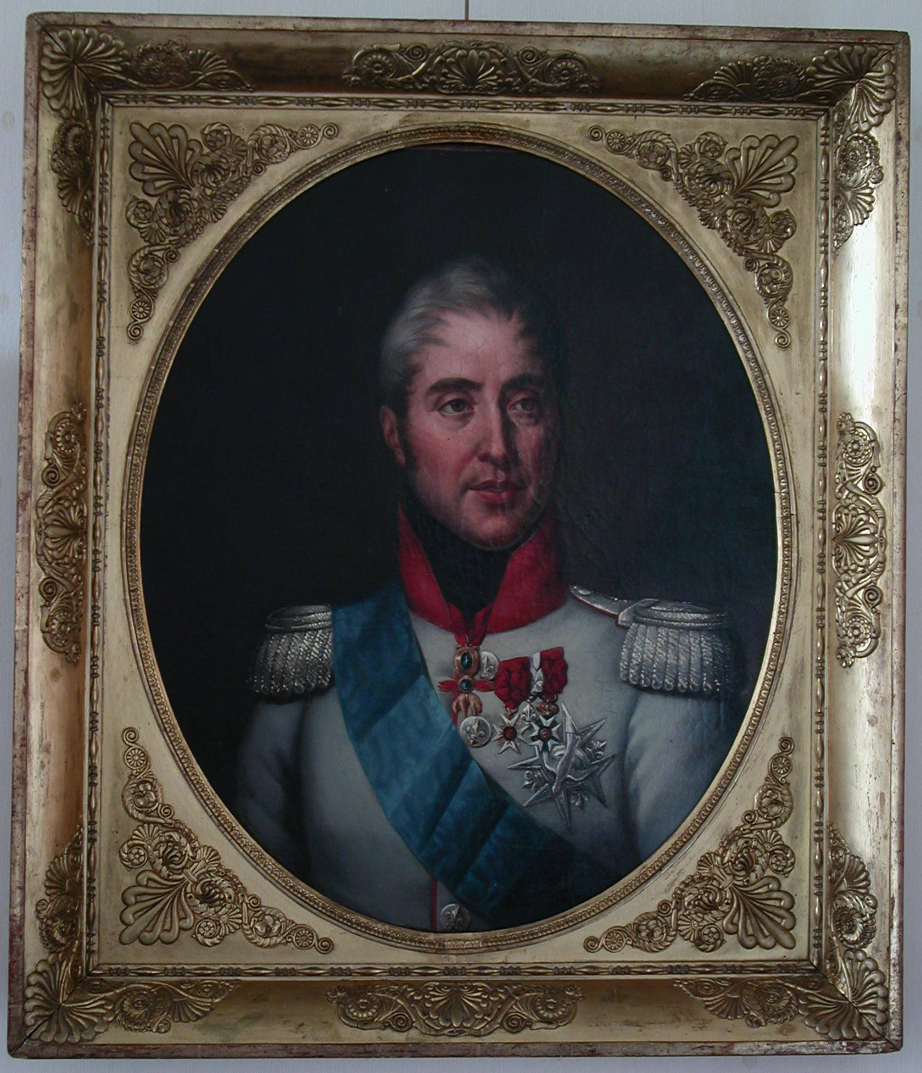 Comte d'Artois (futur Charles X) par Jean-François Thuaire (collection particulière)